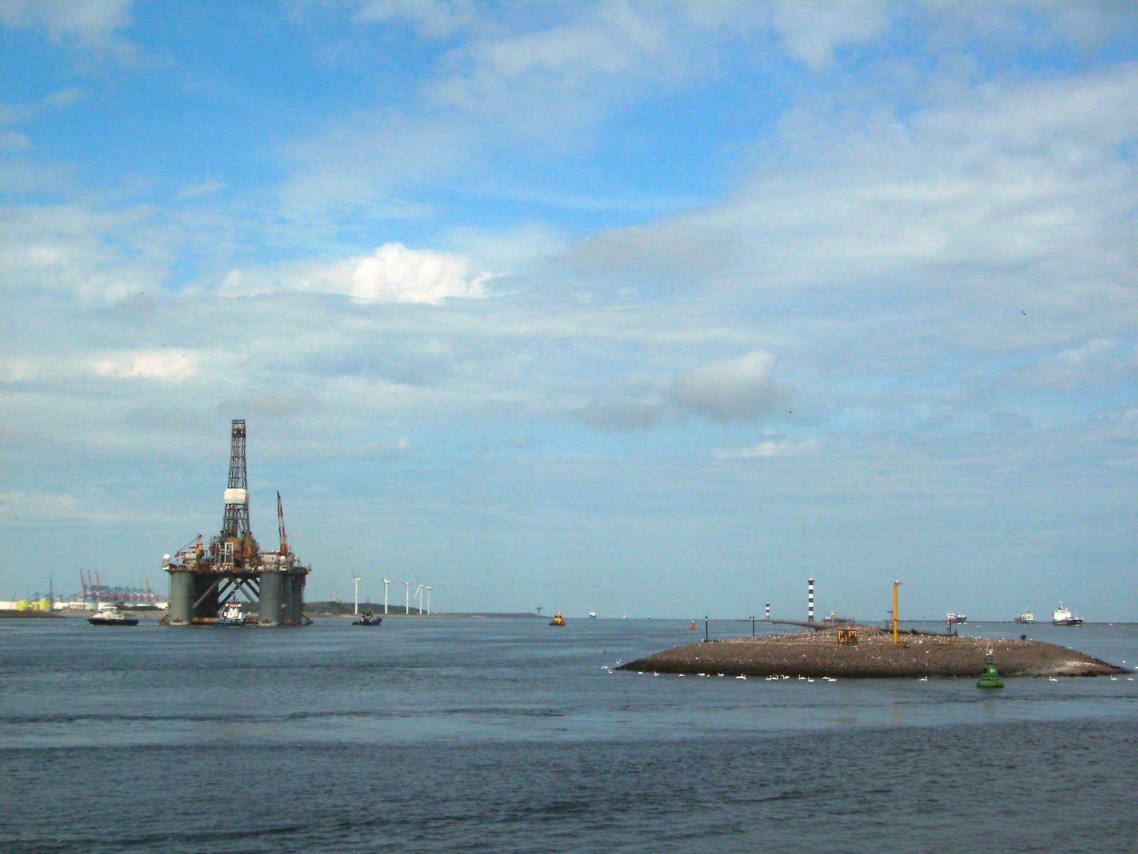 Begin van de Splitsingsdam aan de monding van Nieuwe Waterweg en Calandkanaal gezien vanaf de Rozenburgse landtong